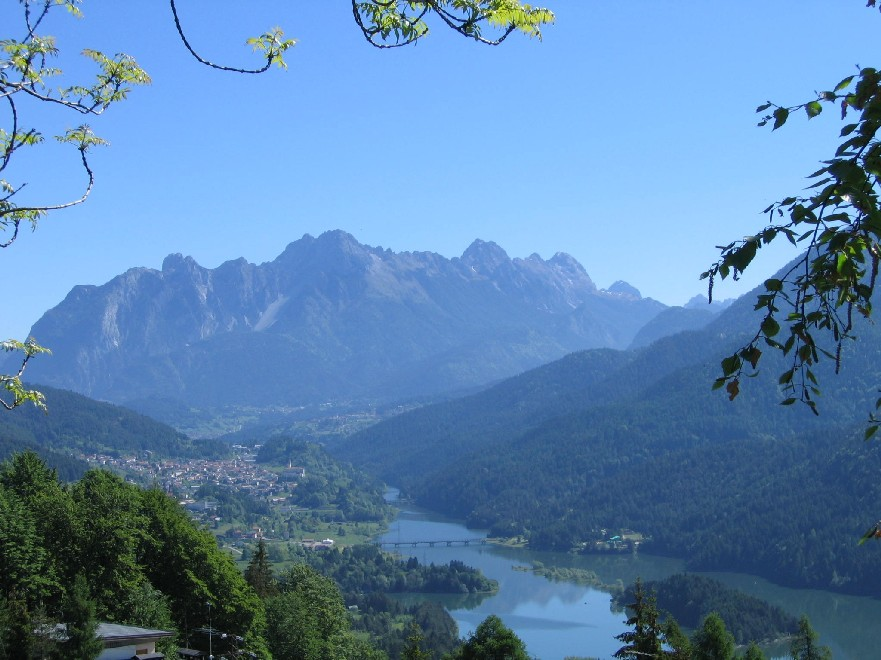 Panorama del Centro Cadore, Belluno, Italy dall'ospedale di Pieve. Sullo sfondo il gruppo del Crissin-Tudaio.